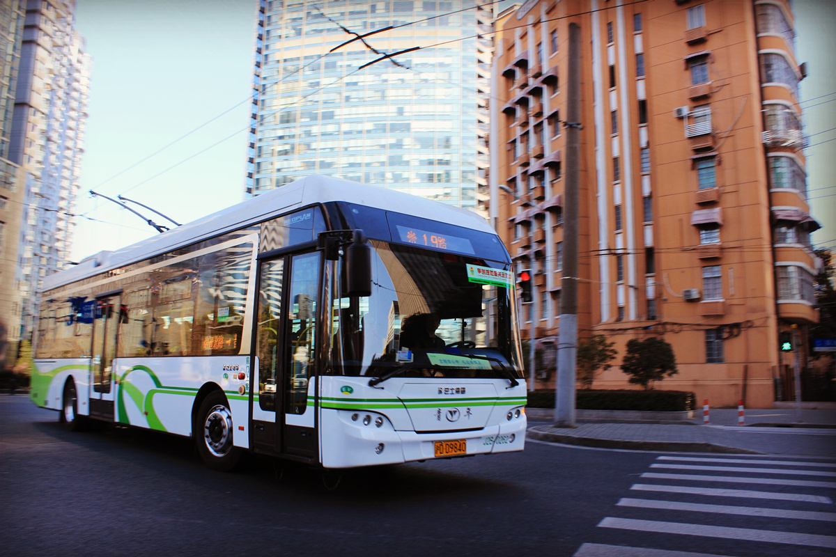 由汉阳路大转至吴淞路（背景为原工部局虹口捕房公寓楼）